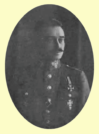 kpt. Stanisław Skrzyński - dowódca Oddziału Polskiego w Odessie